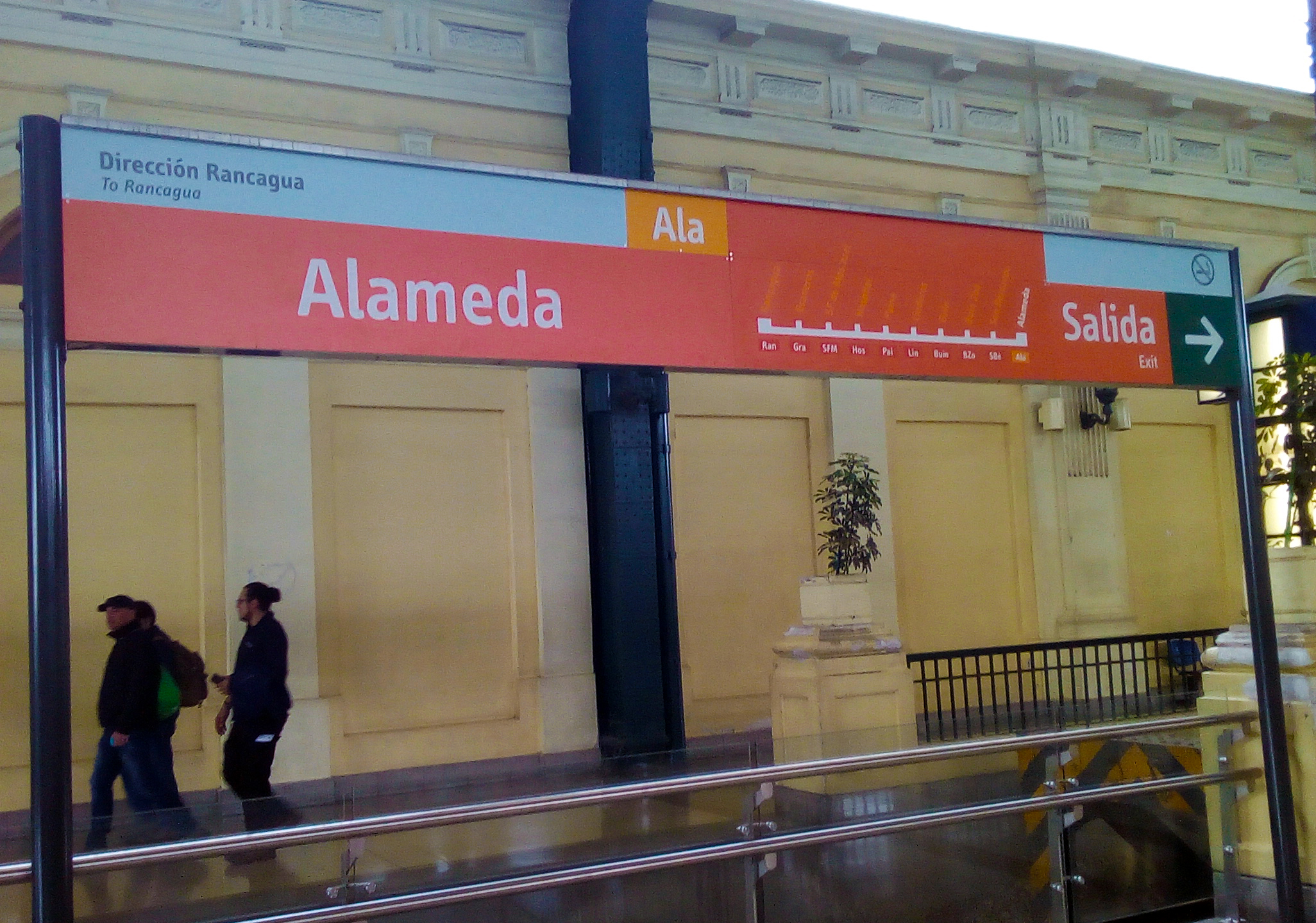 Andén de la estación Alameda del servicio Metrotren Rancagua